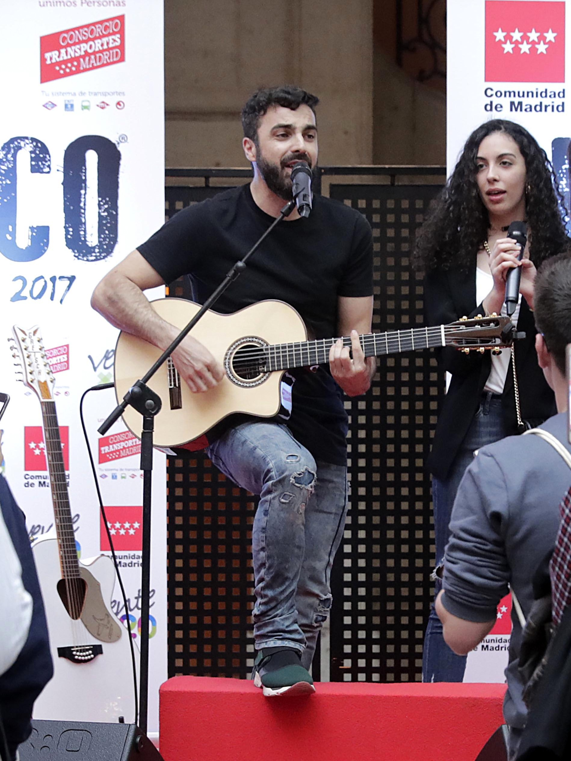 CIFUENTES ASISTE AL ENCUENTRO DEL CANTANTE HUECCO CON 50 USUARIOS DEL ABONO JOVEN EN LA REAL CASA DE CORREOS La presidenta de la Comunidad de Madrid, Cristina Cifuentes, asiste al encuentro exclusivo que tendrán 50 usuarios del Abono Joven con el cantante Huecco, organizado en la Real Casa de Correos dentro de las actividades del ‘Ventex20’ para promocionar el abono joven a 20 euros y el transporte público. Los jóvenes tendrán la oportunidad de conocer personalmente al artista y descubrir todos los detalles de su próxima gira, ‘Lobbo Tour 2017’. Foto: D.Sinova / Comunidad de Madrid